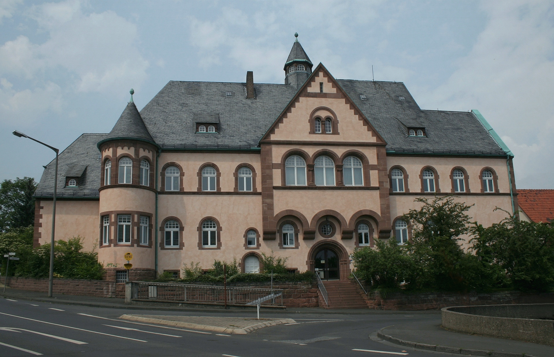 Gebäude des Amtsgerichts in Fritzlar; erbaut 1906-1907 mit Richterwohnung und Gefängnistrakt